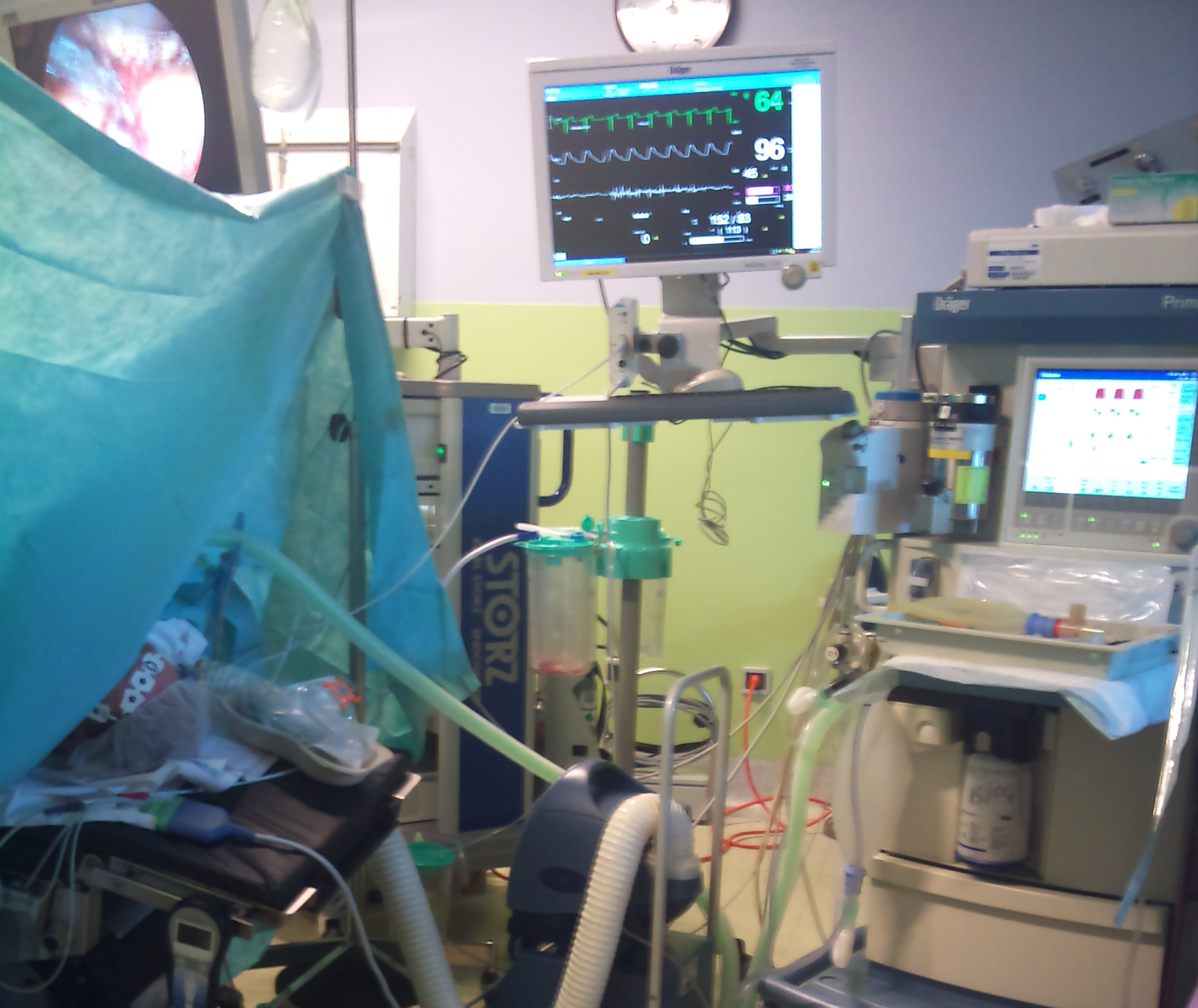 Surveillance de l'anesthésie au bloc opératoire